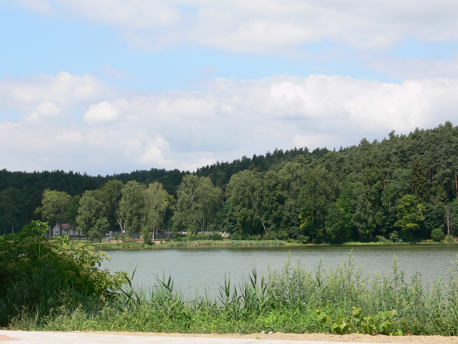 Kalisz Pomorski - Jezioro Młyńskie